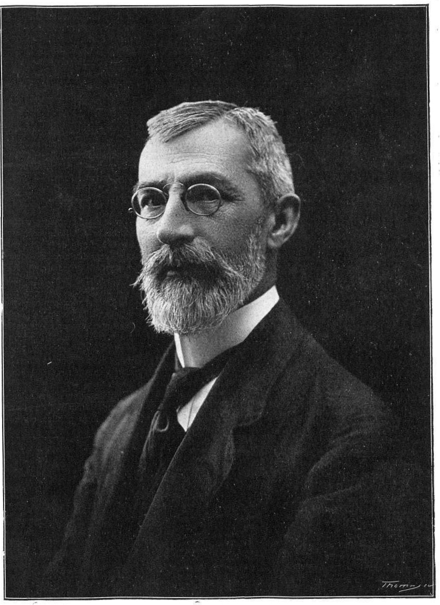 En Raymon d'Abadal, senador. President de l'Assamblea de Parlamentaris, fotografía de Thomas publicada en Ilustració Catalana, Barcelona, 29 de julio de 1917, número monográfico dedicado a la asamblea de parlamentarios celebrada en Barcelona el 18 de julio.